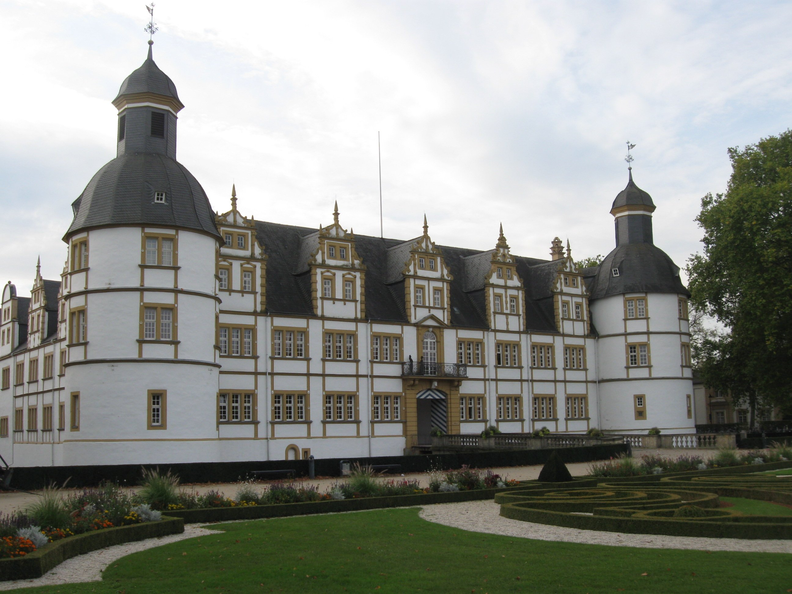 Schloss Neuhaus, Paderborn, Gartenseite